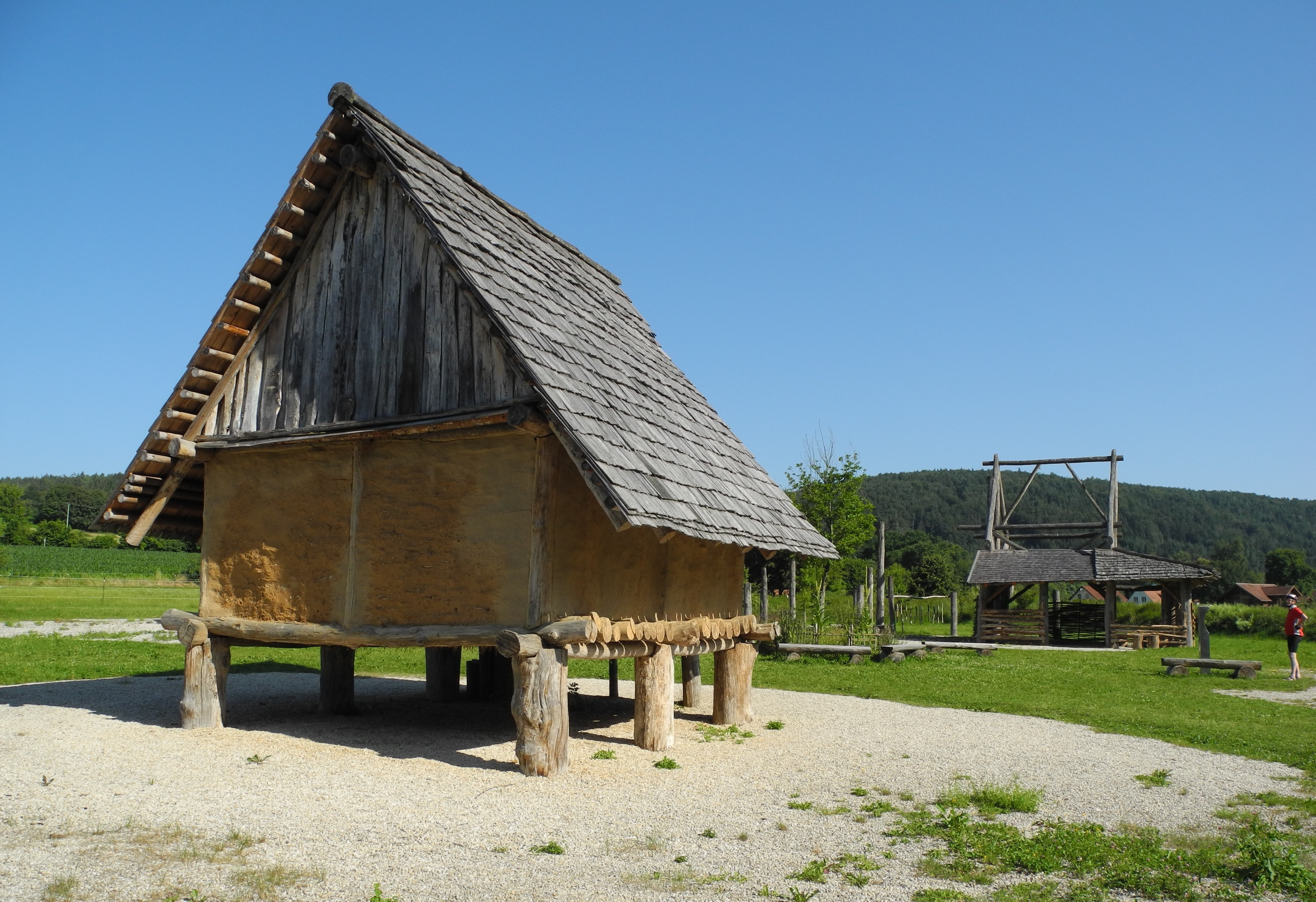 Riedenburg - Archäologiepark Altmühltal_06